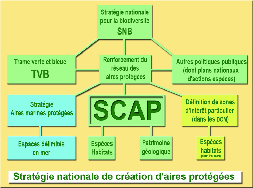 Schéma de présentation de la SCAP (Stratégie nationale de création d'aires protégées) en France (2010-1011, faisant suite au Grenelle de l'Environnement et à la mise à jour de la stratégie nationale pour la biodiversité.